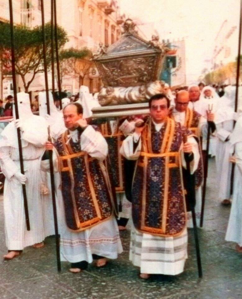 Sabato Santo 1984, tratto di Corso Vittorio Emanuele II. L'urna argentea contenente la Santissima Eucarestia è sorretta a spalla da quattro sacerdoti a piedi scalzi, in segno di penitenza e riparazione a ciò che secoli addietro avvenne a Trani profanando l'Ostia consacrata.